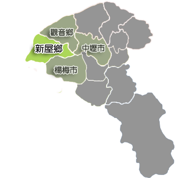 新屋鄉行政區劃